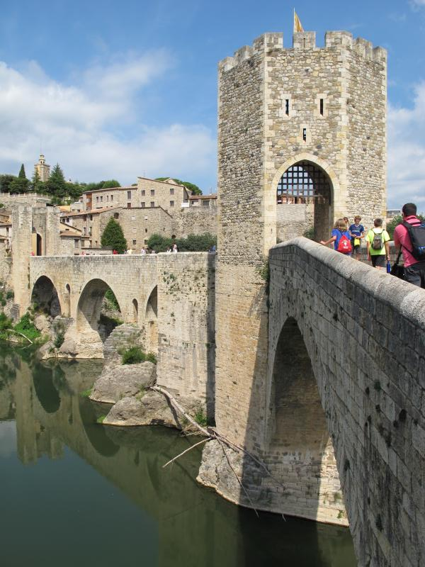 Puente medieval (Besalú)